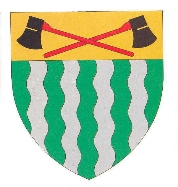 Blason de Kango